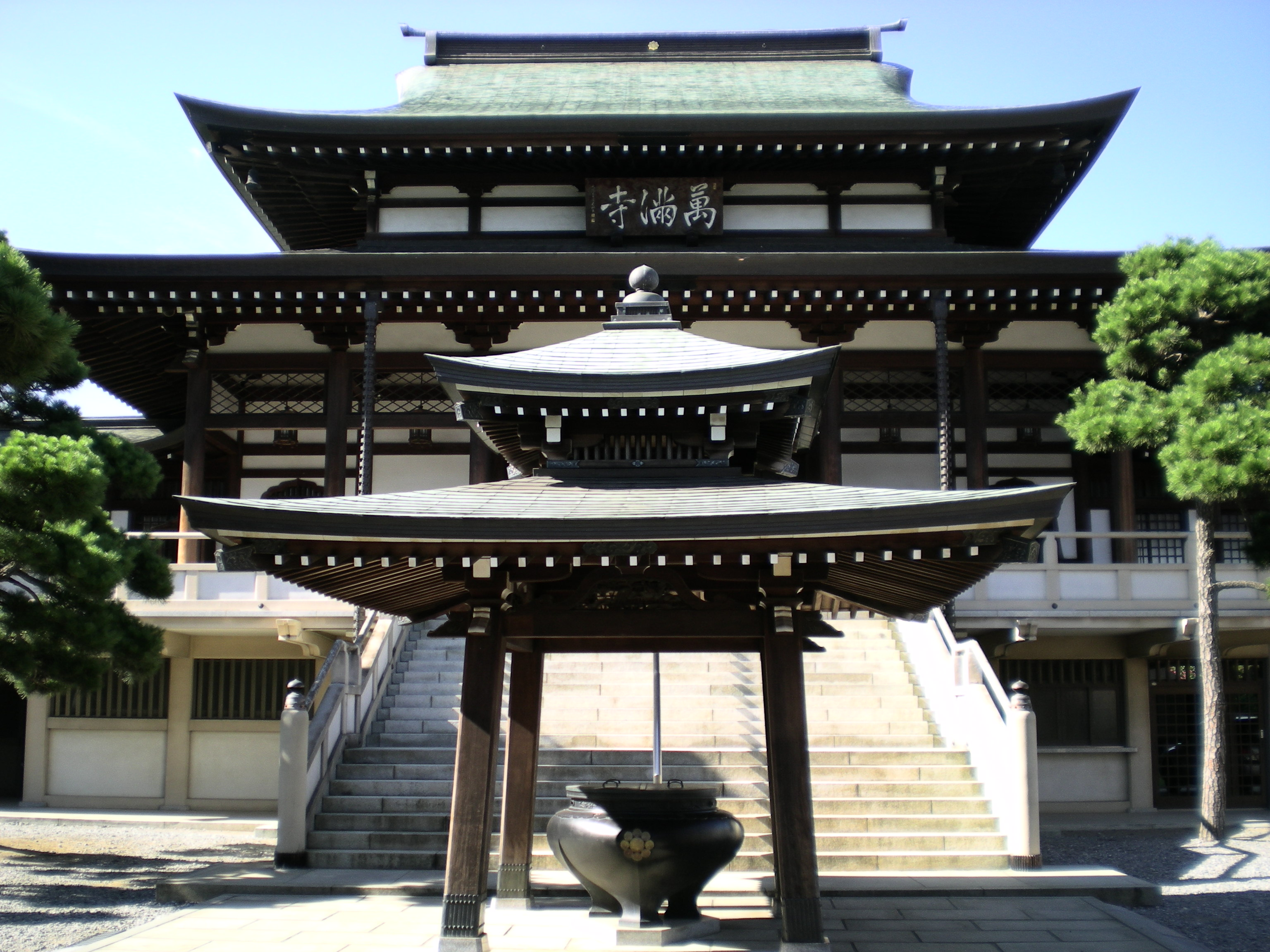 万満寺 Manmanji